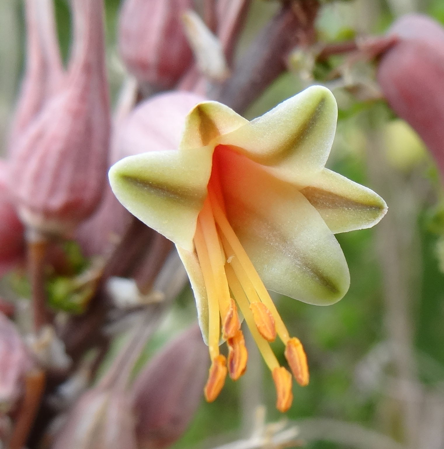 Aloe mossurilensis - perianth detail